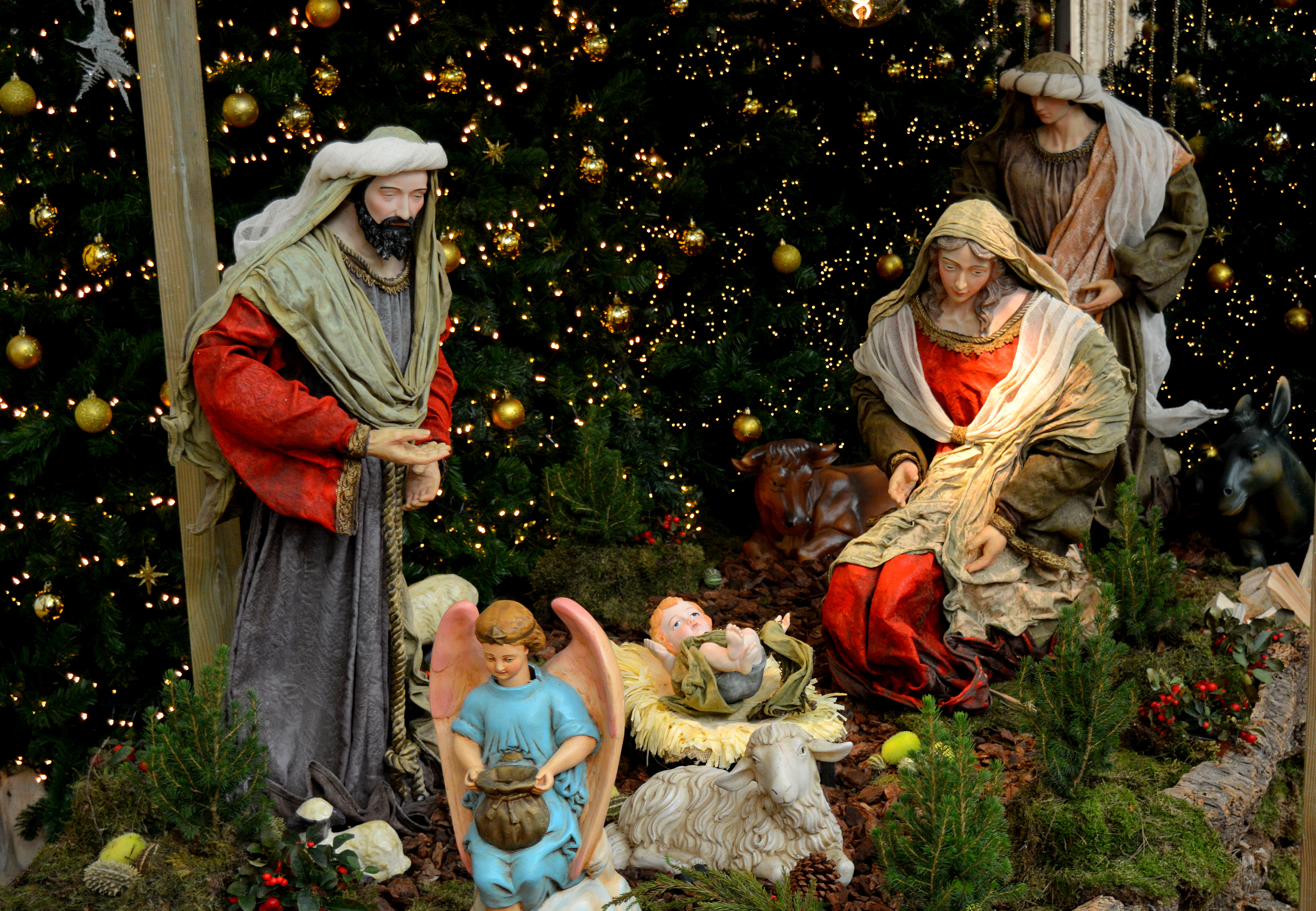 Dronryp, Marije-Bertetsjerke, kryststâl (2017)